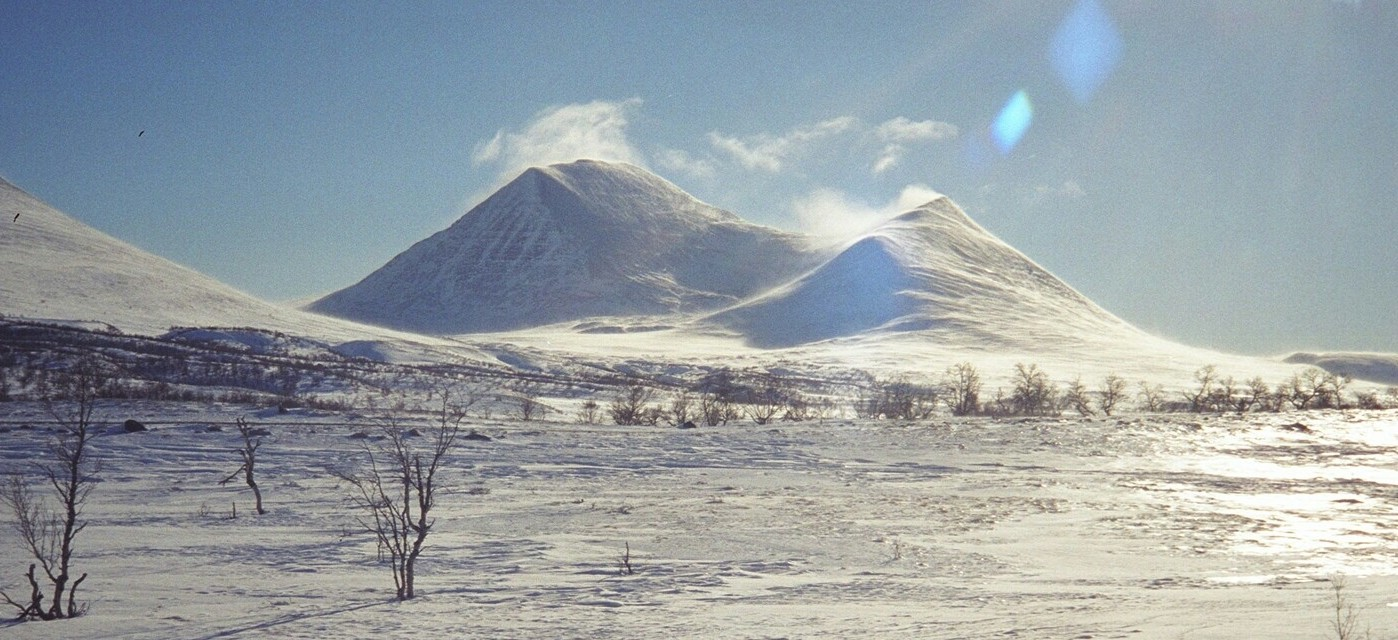 Store Sølnkletten (1827 moh) i Alvdal, Hedmark, sett fra nord. Til høyre Spisskletten (1690 moh).